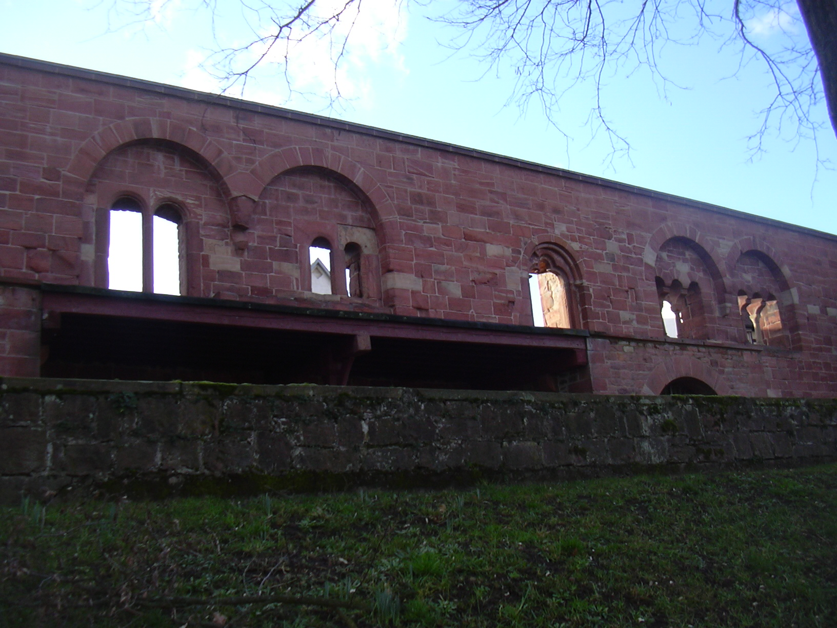 Seligenstadt, Palatium